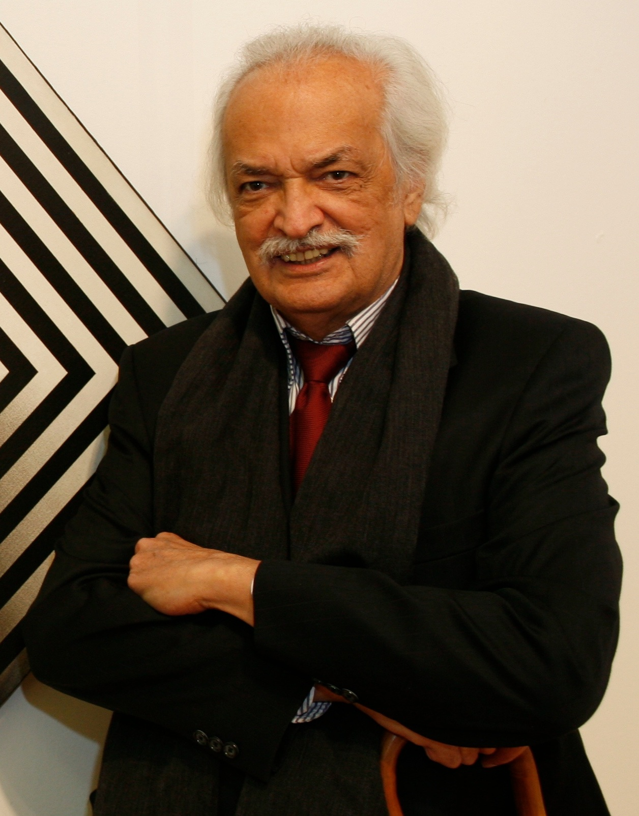 Omar Rayo